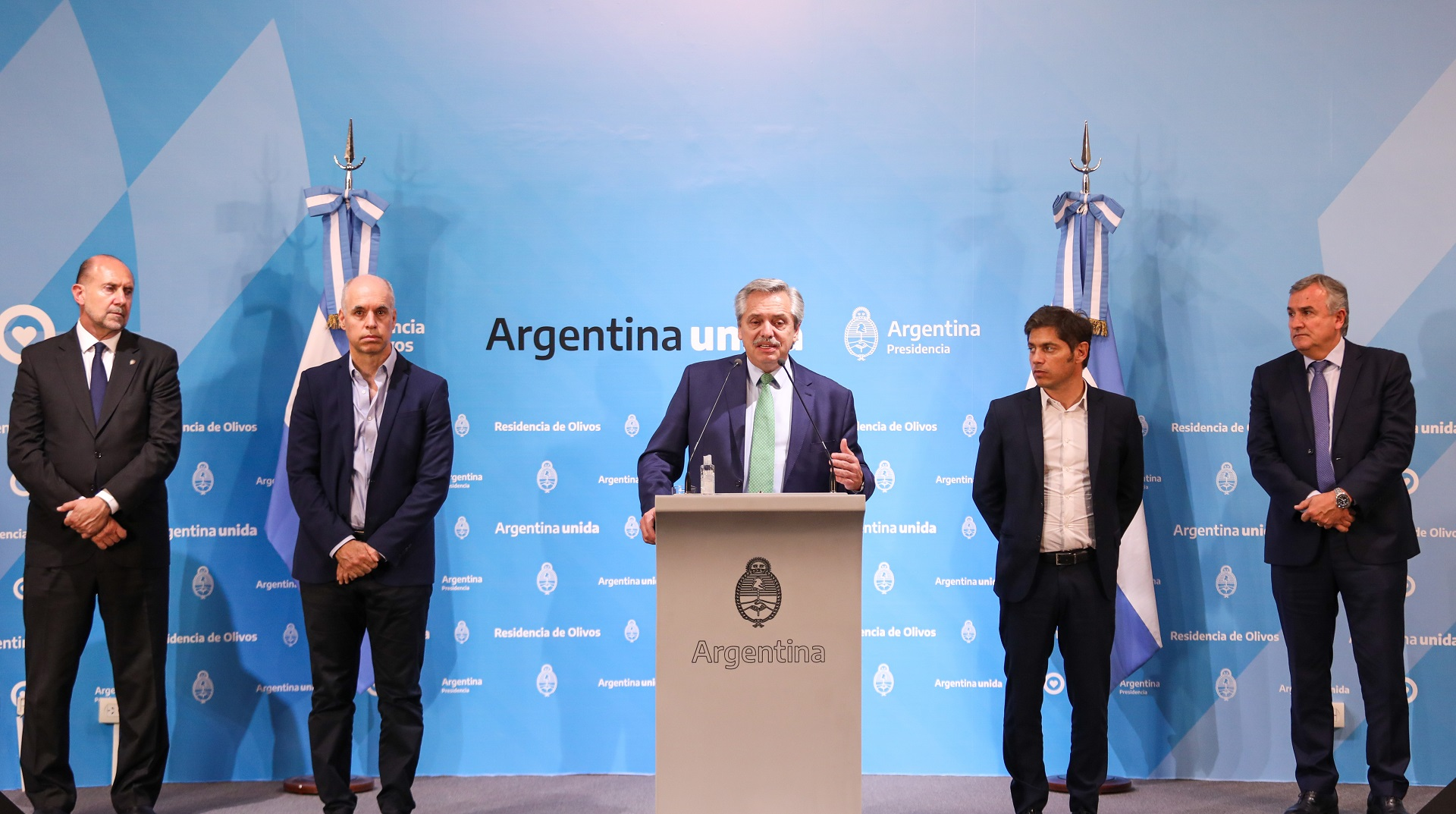 El presidente de Argentina anuncia la cuarentena para combatir el corona virus, acompañado de gobernadores. En la foto de izquierda a derecha_ Omar Perotti, gobernador de la provincia de Santa Fe; Horacio Rodríguez Larreta, jefe de gobierno de la Ciudad de Buenos Aires; Alberto Fernández, presidente de la Nación; Axel Kicillof, gobernador de la provincia de Buenos Aires; Gerardo Morales, gobernador de la provincia de Jujuy.